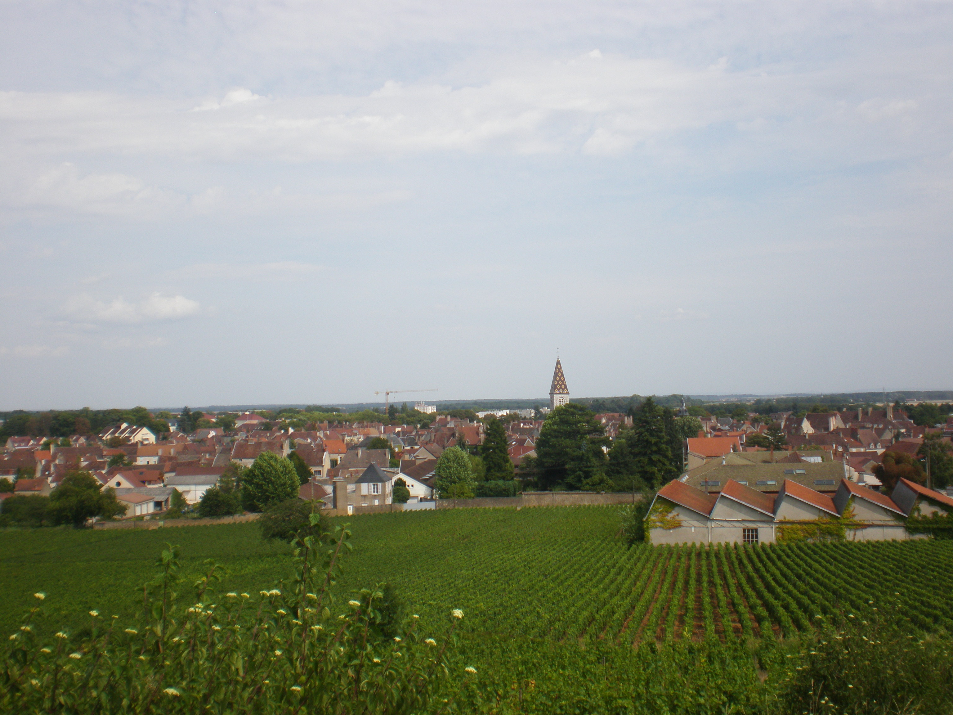 Vue de Nuits-Saint-Georges dans une côte